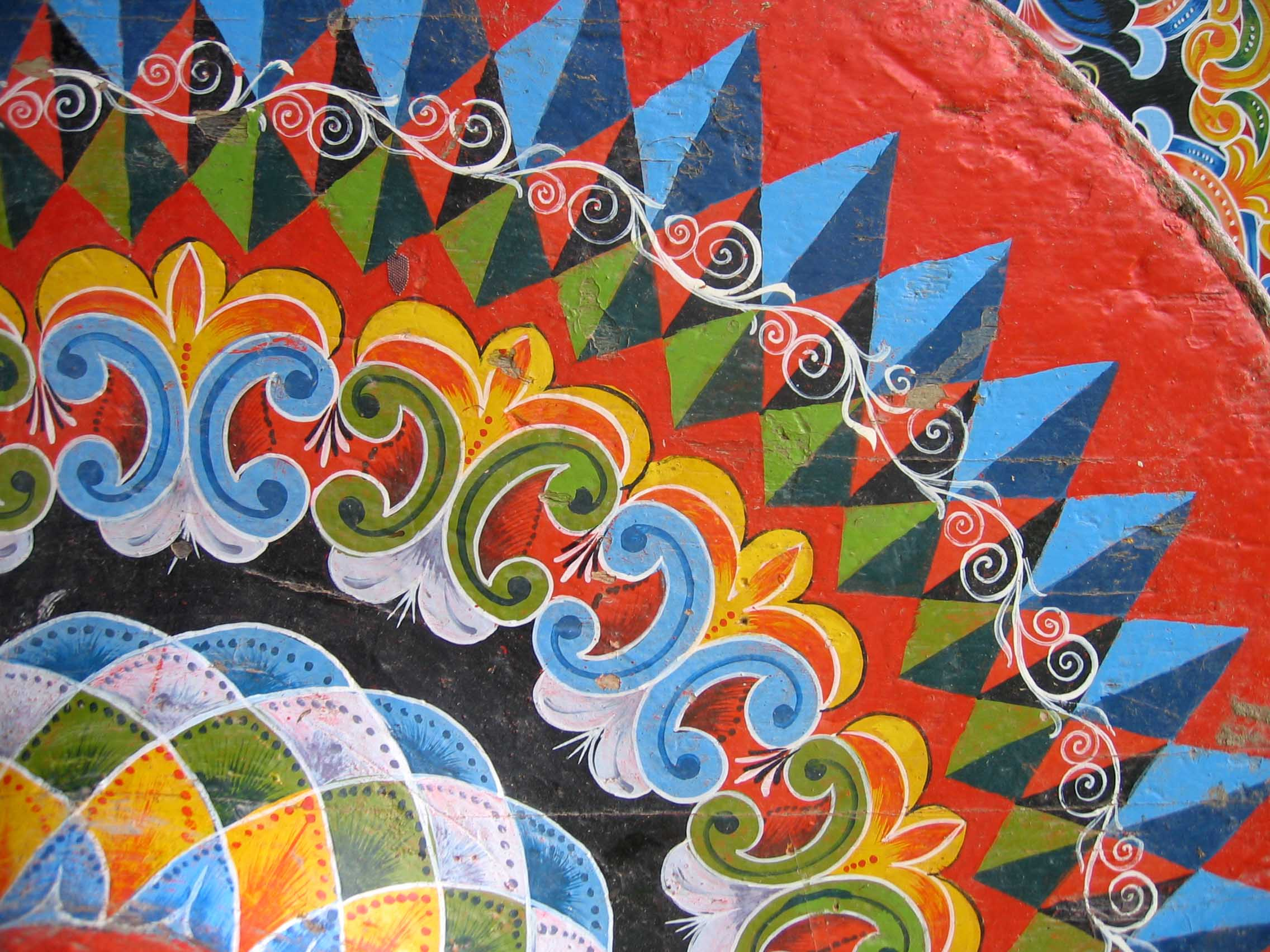 Detalle de una rueda de carreta típica pintada de Costa Rica.